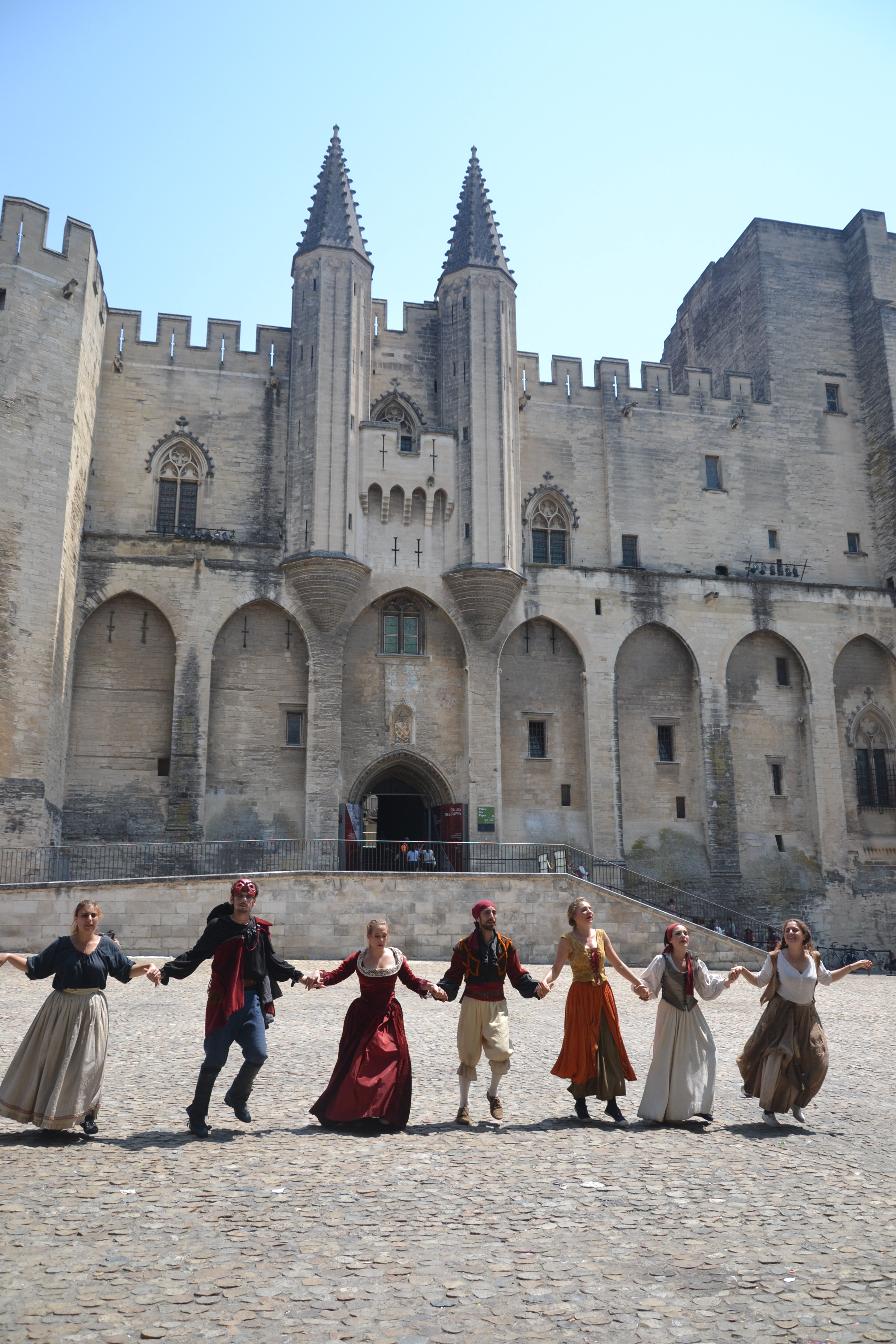 Palais des papesbâtiment conventuel, cloître, chapelle, galerie, élévation, toiture, sol, entrée .